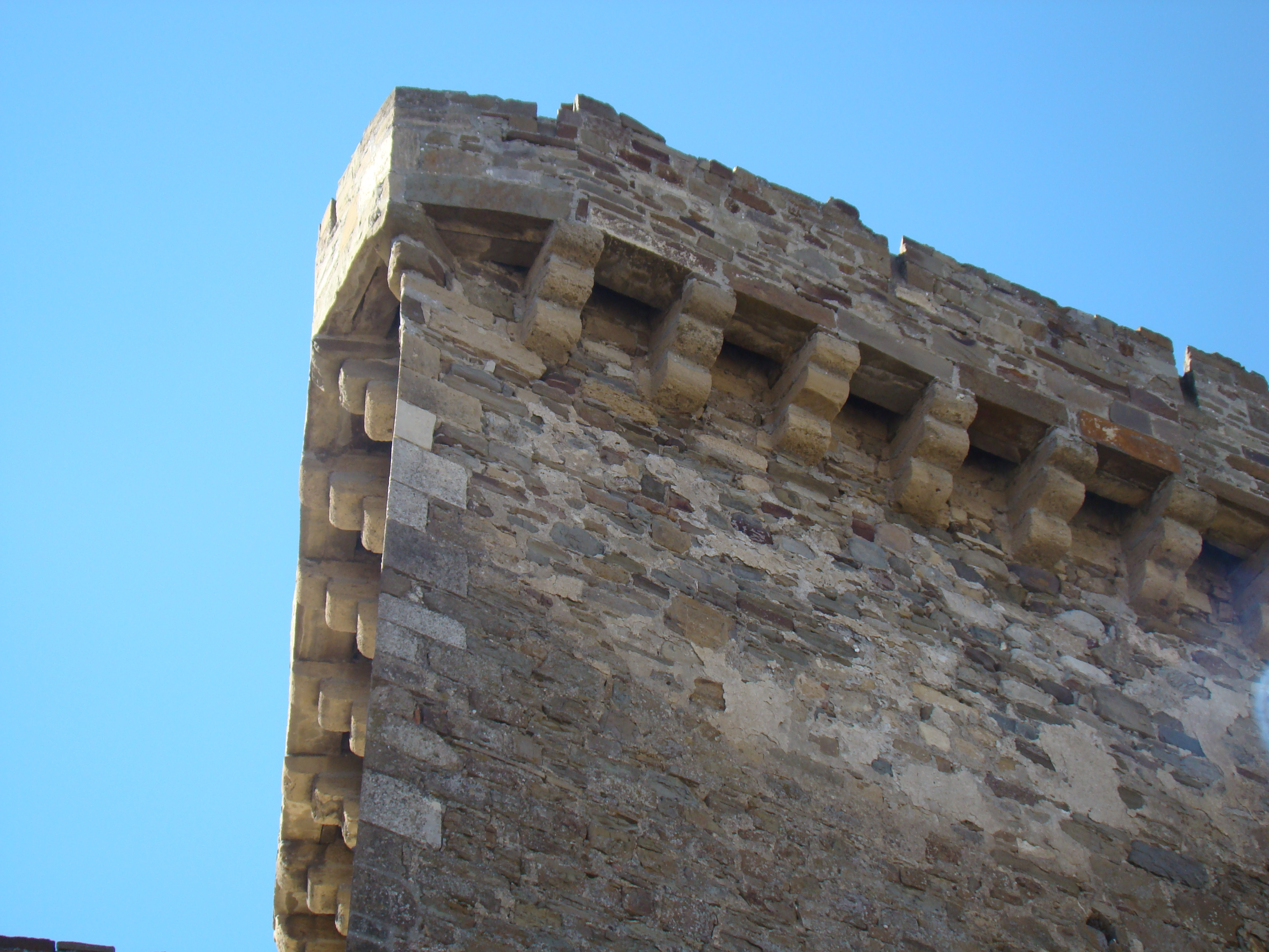 Башта № 15 Якопо Торселло (мур.), Судак, Фортечна гора